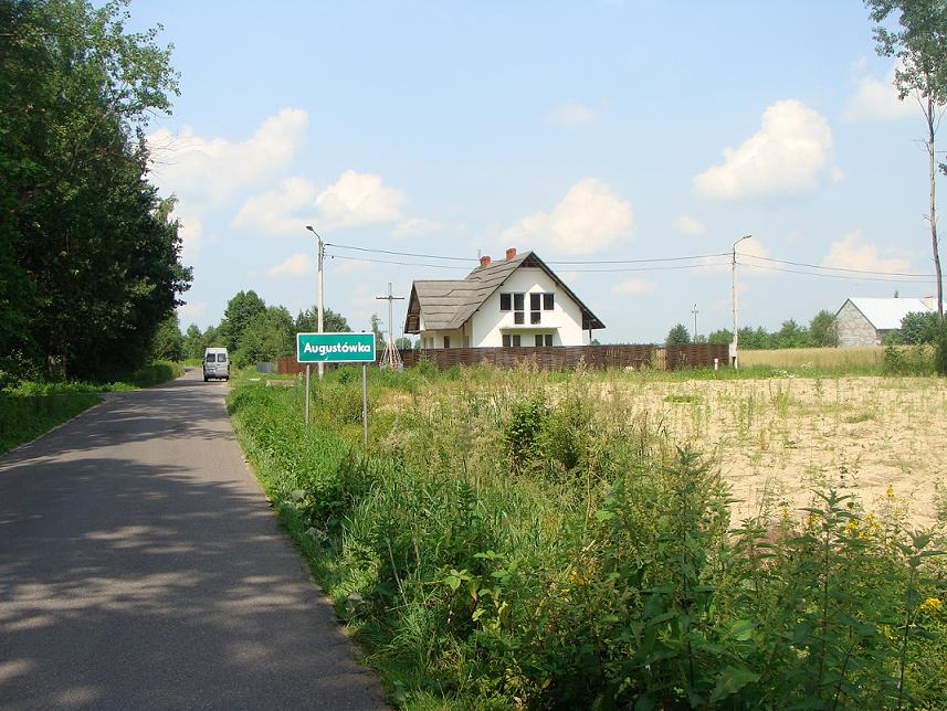 Wieś Augustówka, gm. Osieck, ul. Kołbielska